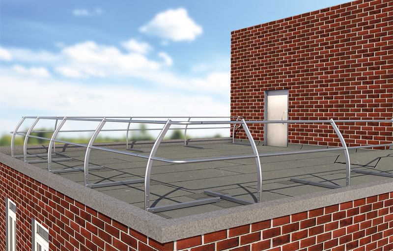 Schutzgeländer auf Bitumendach